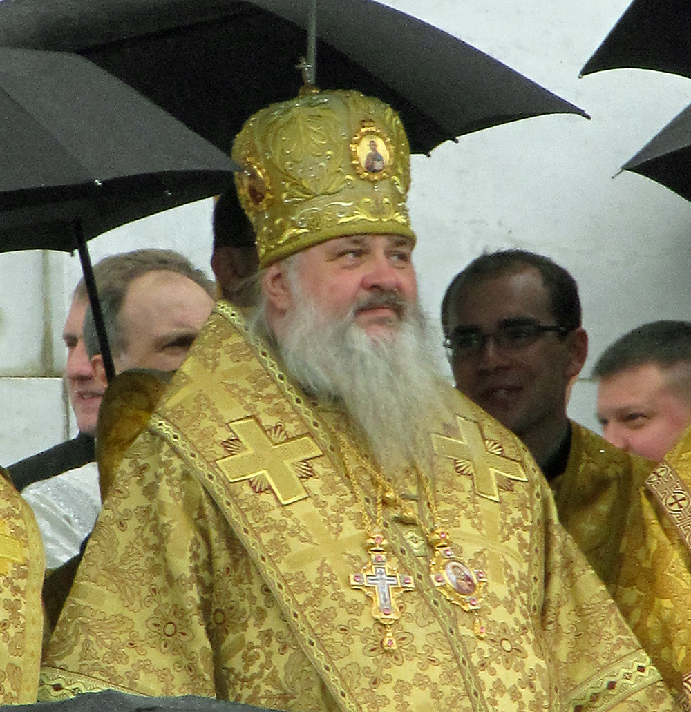 Епископ Видновский Тихон (Недосекин) на праздничной службе в честь 200-летия победы в Отечественной войне 1812 года возле Храма Христа Спасителя. 9 сентября 2012 года